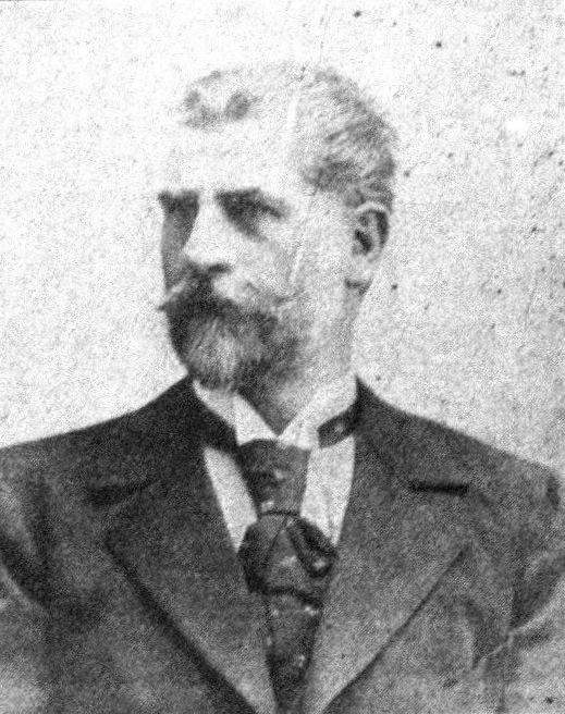 Österreichischer Politiker, Reichsratswahl 1907, Name siehe Dateiname